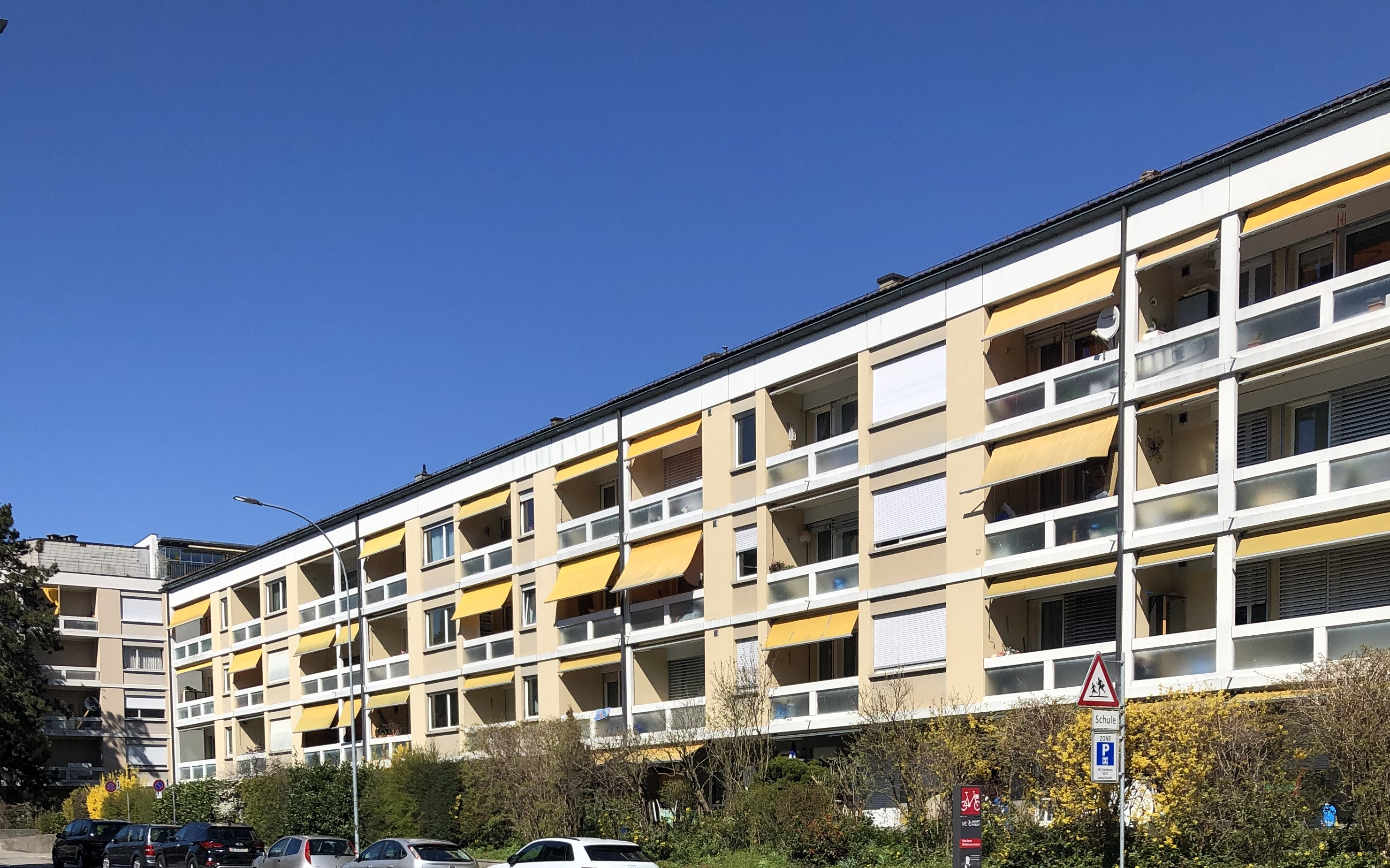 Blumenfeld modernere Bebaung